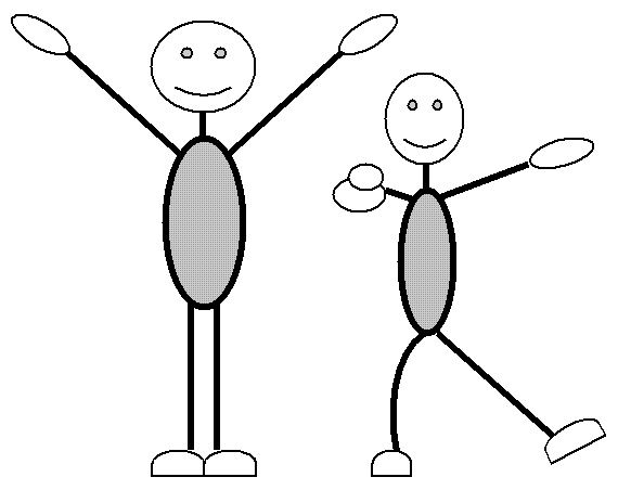 日本のお笑いコンビ「8.6秒バズーカー」のネタ「ラッスンゴレライ」の決めポーズ